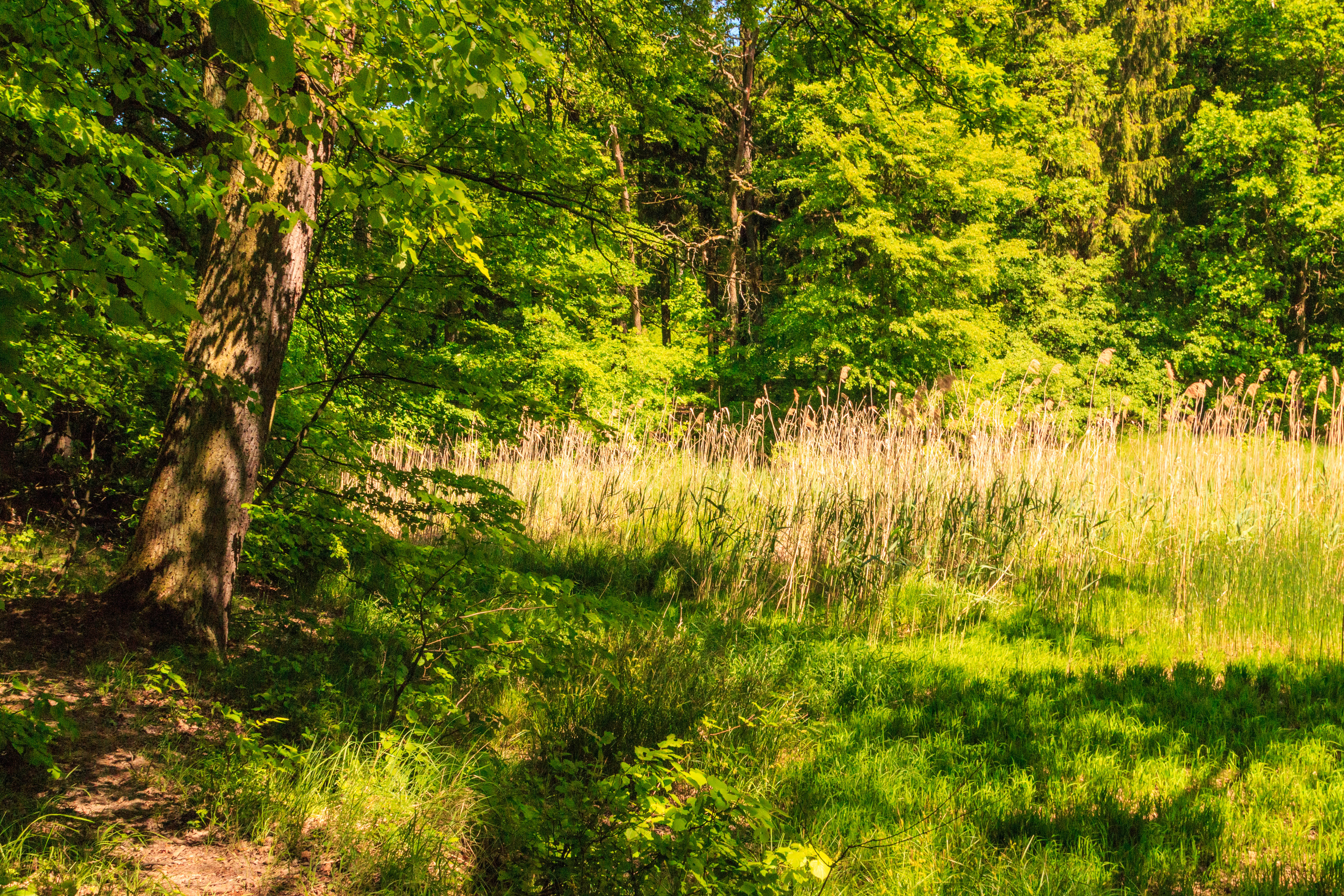 Lesní rybníček u Nového Přímu Project: Vodstvo.